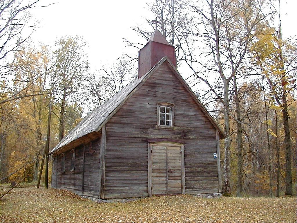 Katholische Kirche St. Johannes der Täufer in Kankaļi, Gemeinde Mazzalvas, Bezirk Nereta, Lettland.